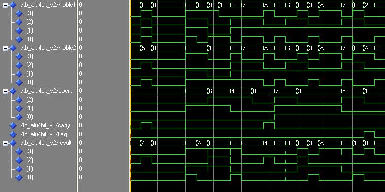 4 Bit ALU Xilinx ISE simulation result